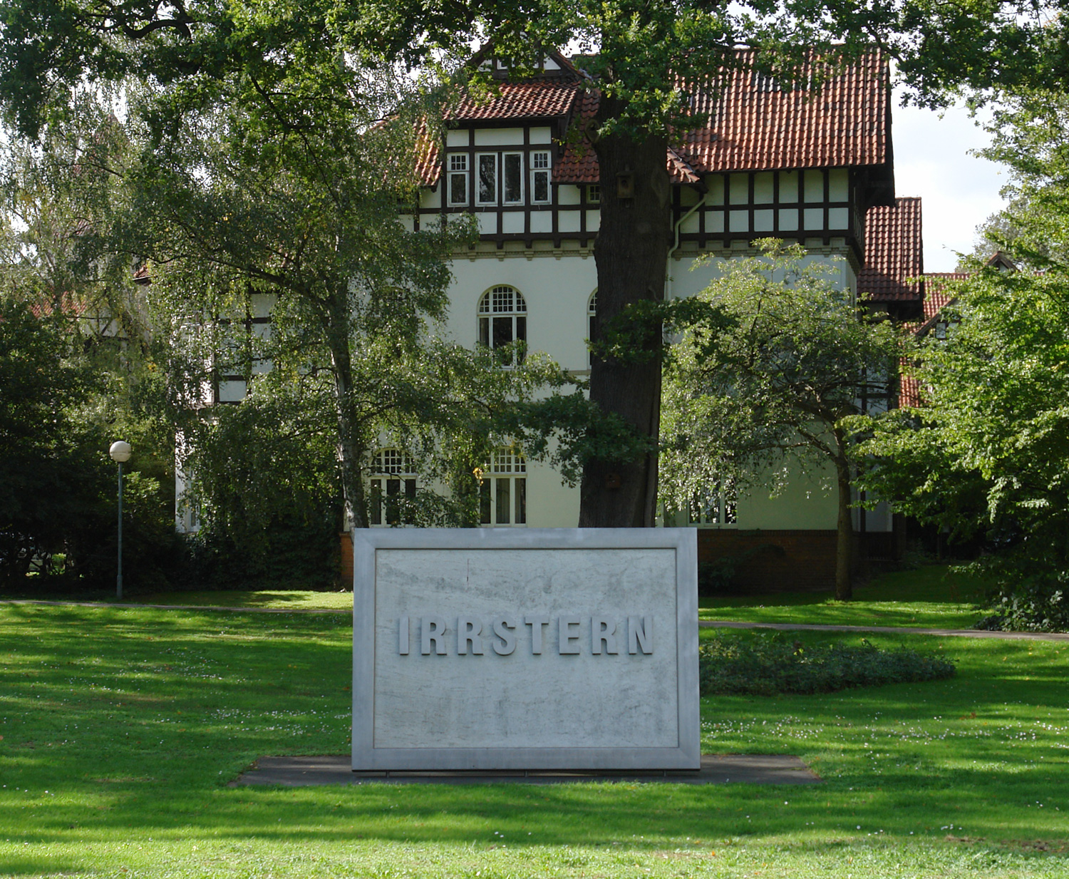 Klinikum Bremen-Ost. Kunst im öffentlichen Raum: Irrstern, Marikke Heinz-Hoek, 2000. Ein Mahnmal für die Opfer der Psychiatrie im 3. Reich k: kunst im öffentlichen raum bremen